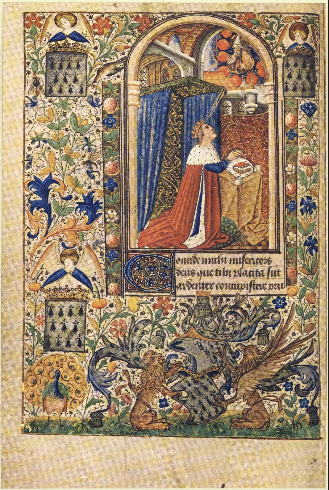 Miniatur Peter II. im Gebet